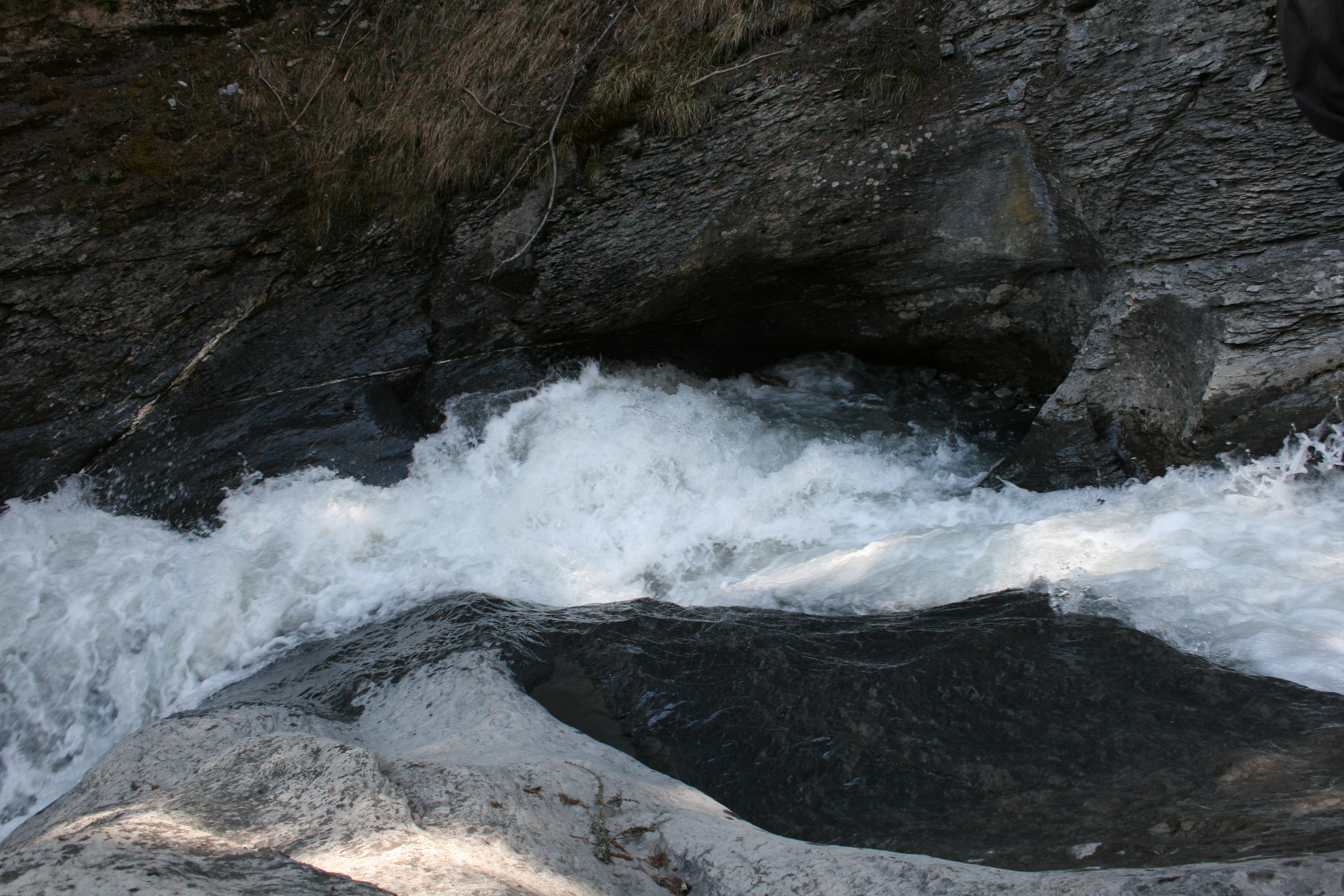 Raspille river - By Mat - La corrente prima della cascata